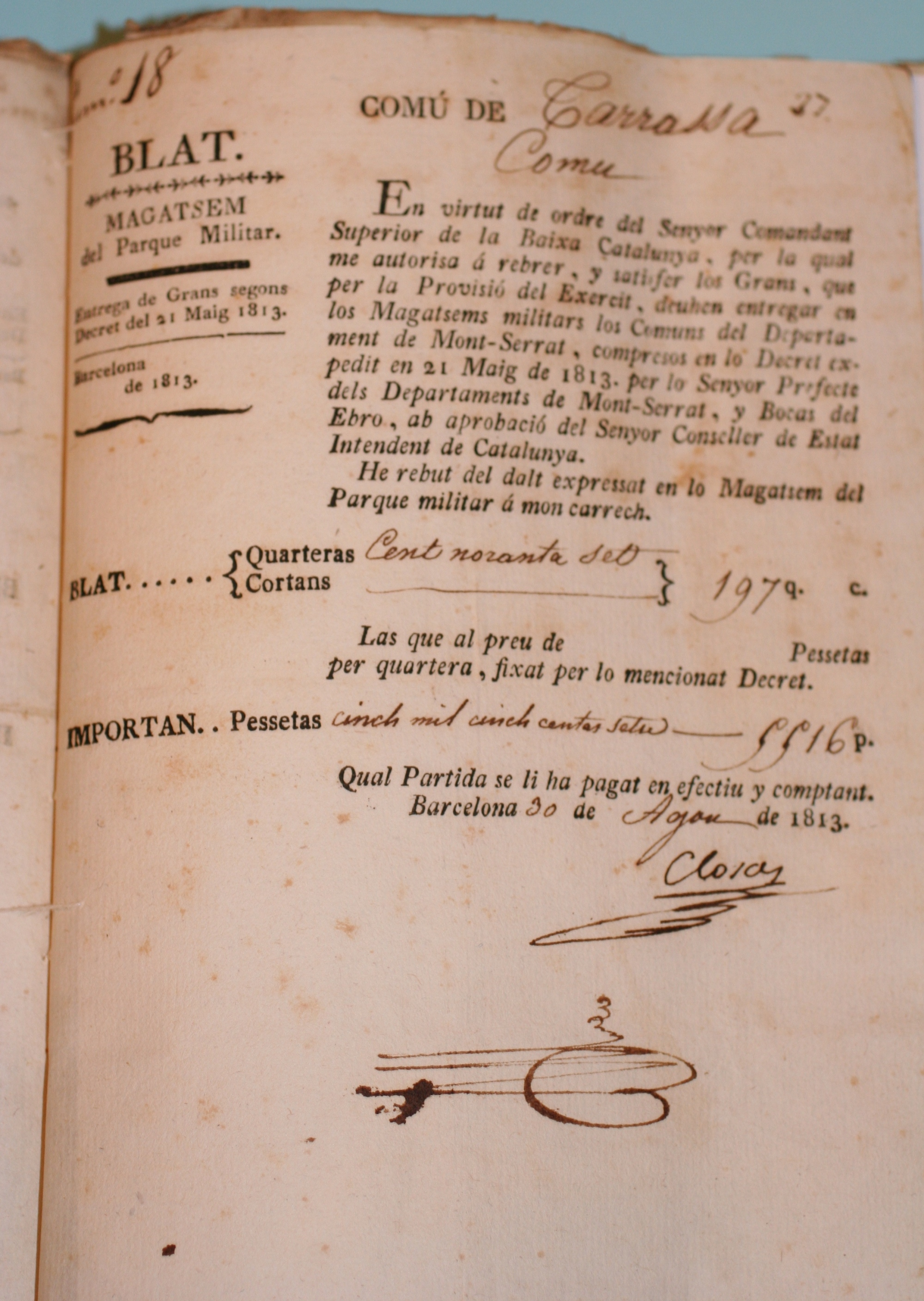 Rebut del municipi de Terrassa del lliurament de blat a l’exèrcit francès del 30 d'agost d'1813